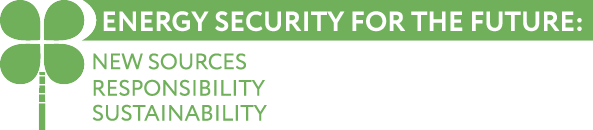 Energy Security for the Future: New Sources, Responsibility, Sustainability_ESF